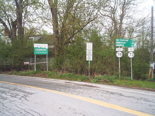 Vermont State Route 74